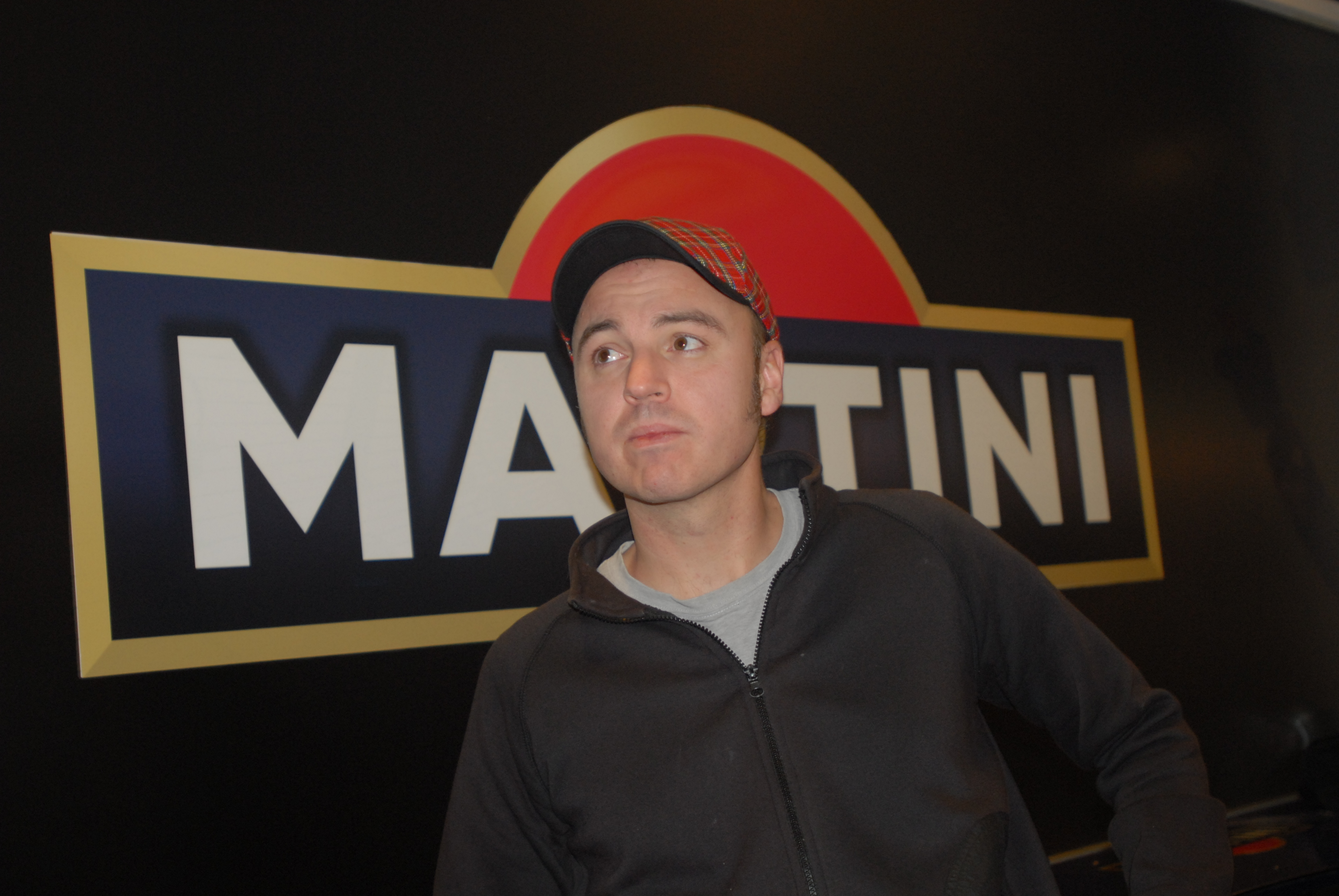 Lutxo Egia idazle eta gidoilaria. Argazkia: Javier Atxa